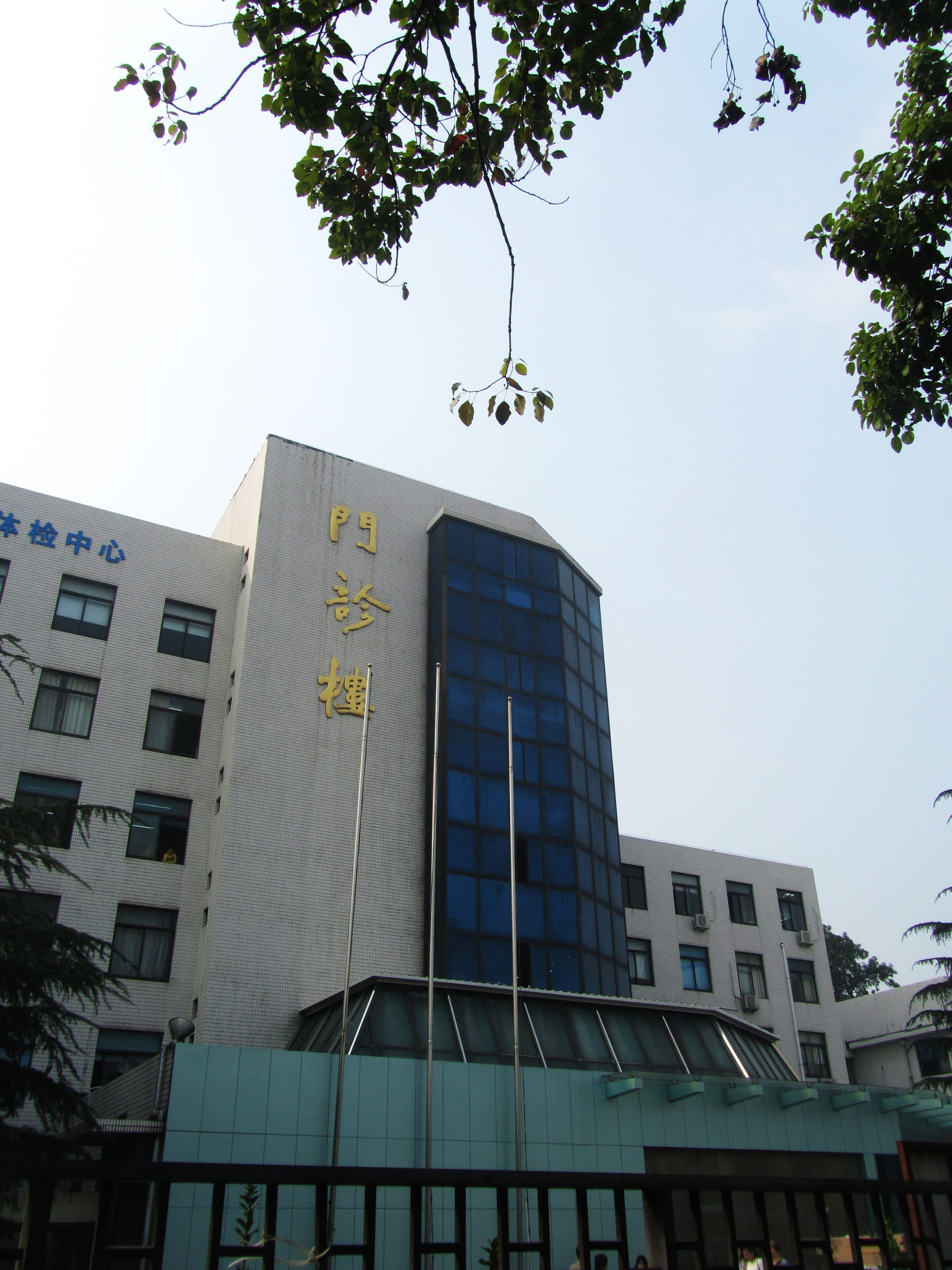 宜兴市人民医院门诊楼。